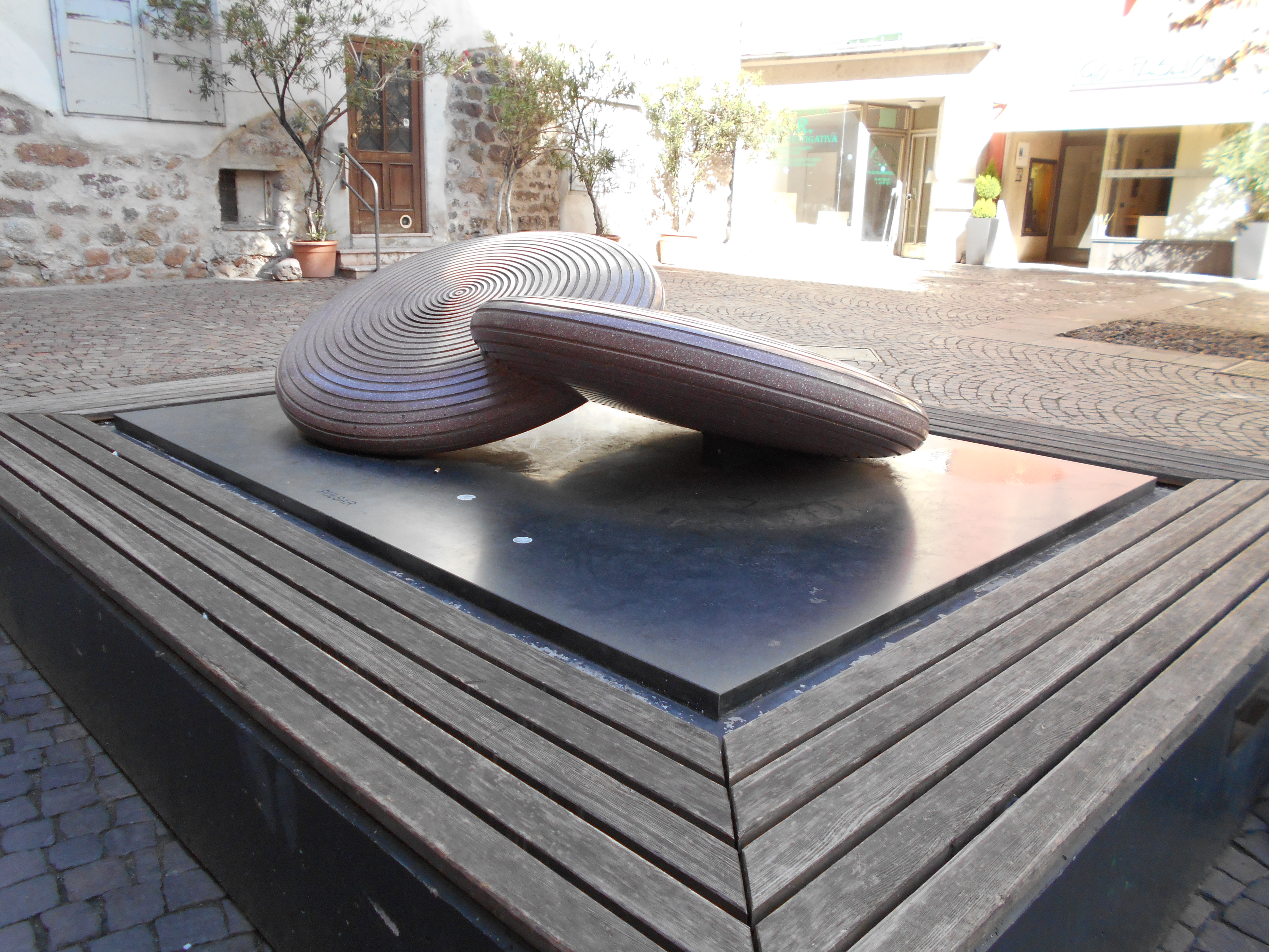 Gianpietro Carlesso, Pulsar 2009, Bolzano posizionata in vicolo Gumer